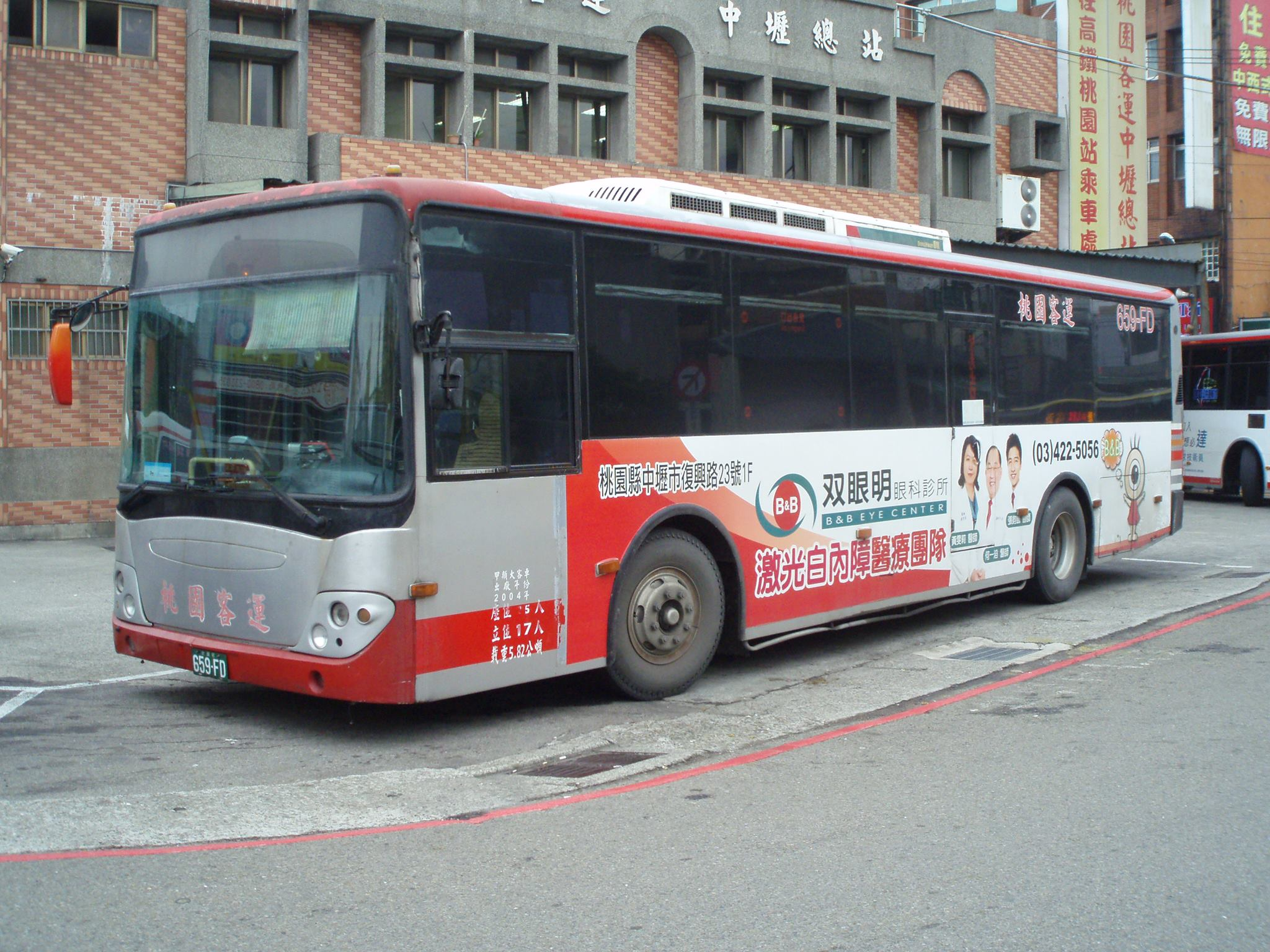 桃園客運2004年大宇大客車659-FD停靠桃園客運中壢總站